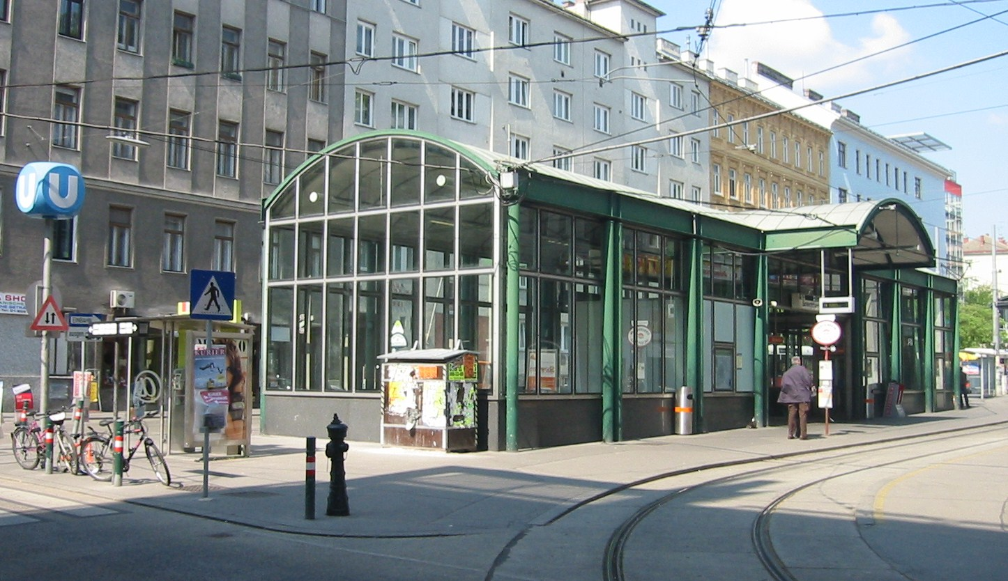 Wien U3 Schlachthausgasse